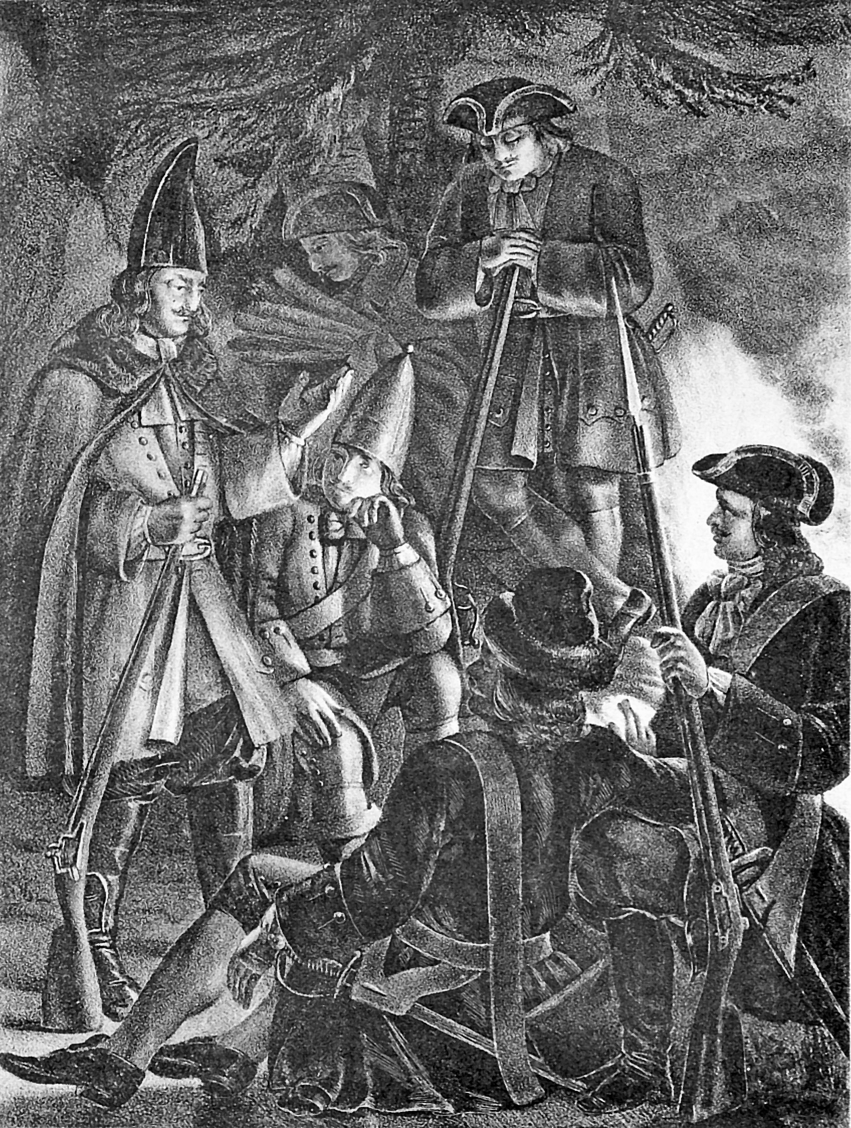 Украинская Ландмилиция, с 1713 по 1736-й год. Эта картинка была также использована для иллюстрирования статьи «Ландмилиция» опубликованной в четырнадцатом томе «Военной энциклопедии», который был издан книгоиздательским товариществом И. Д. Сытина в 1914 году в столице Российской империи городе Санкт-Петербурге. Более подробное описание к этому рисунку можно прочесть в указанной выше статье на сайте Русской Викитеки.